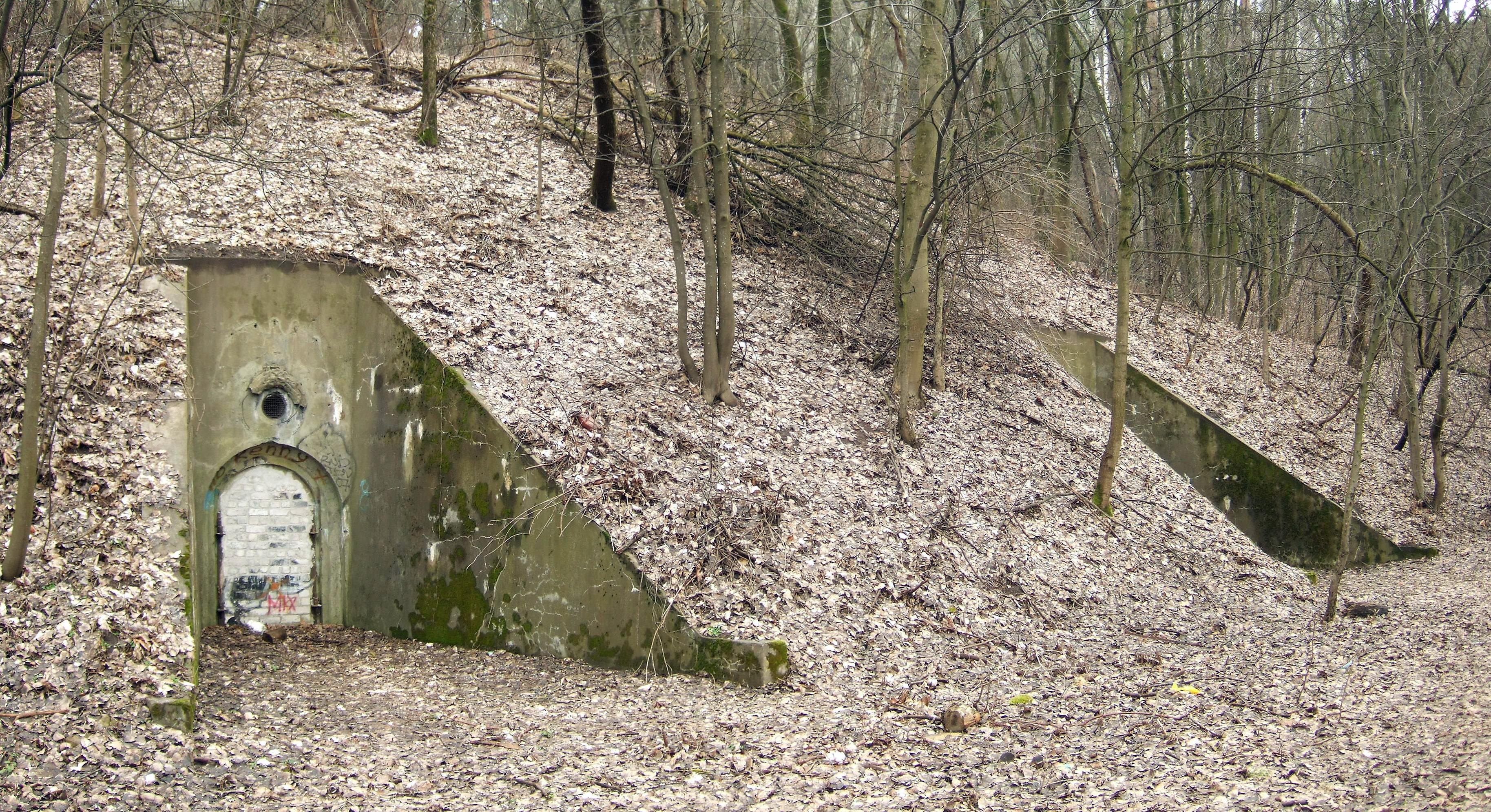 Šnipiškių bunkeriai